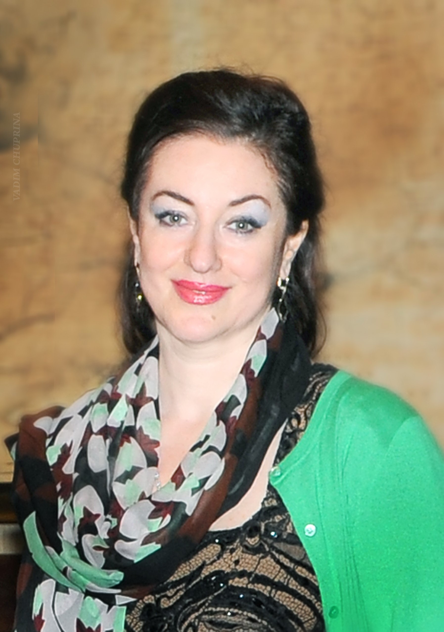 Гвердцители, Тамара Михайловна.Фото Чуприна Вадим